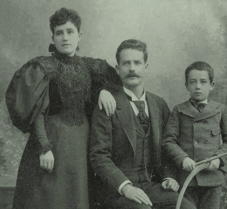 El ingeniero Felipe Salido, su esposa, Rafaela Verdugo y su hijo, Felipe.